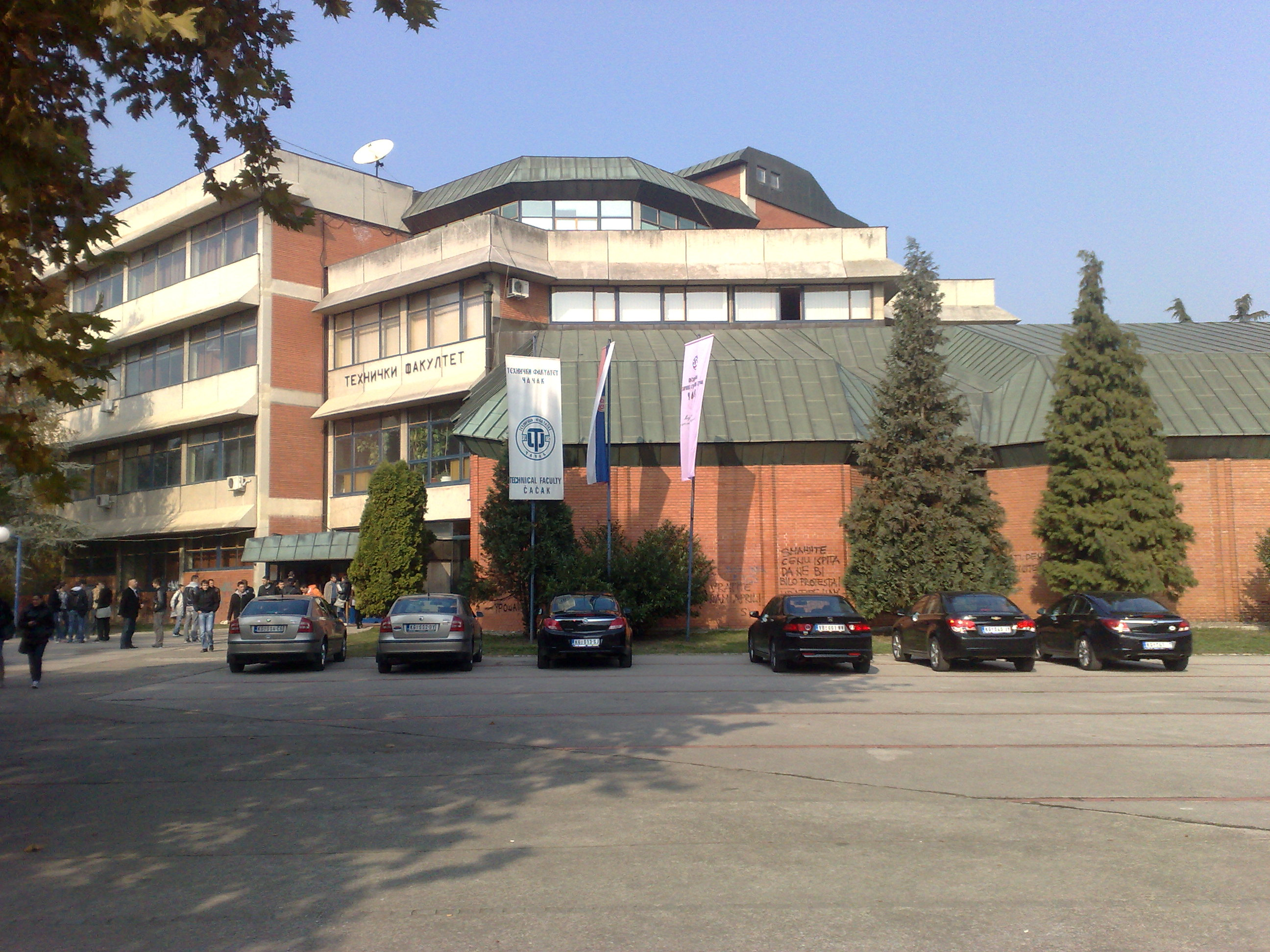 Српски (ћирилица): Технички факултет у Чачку је део Универзитета у Крагујевцу. Основан је 1975. године као педагошко-технички факултет.